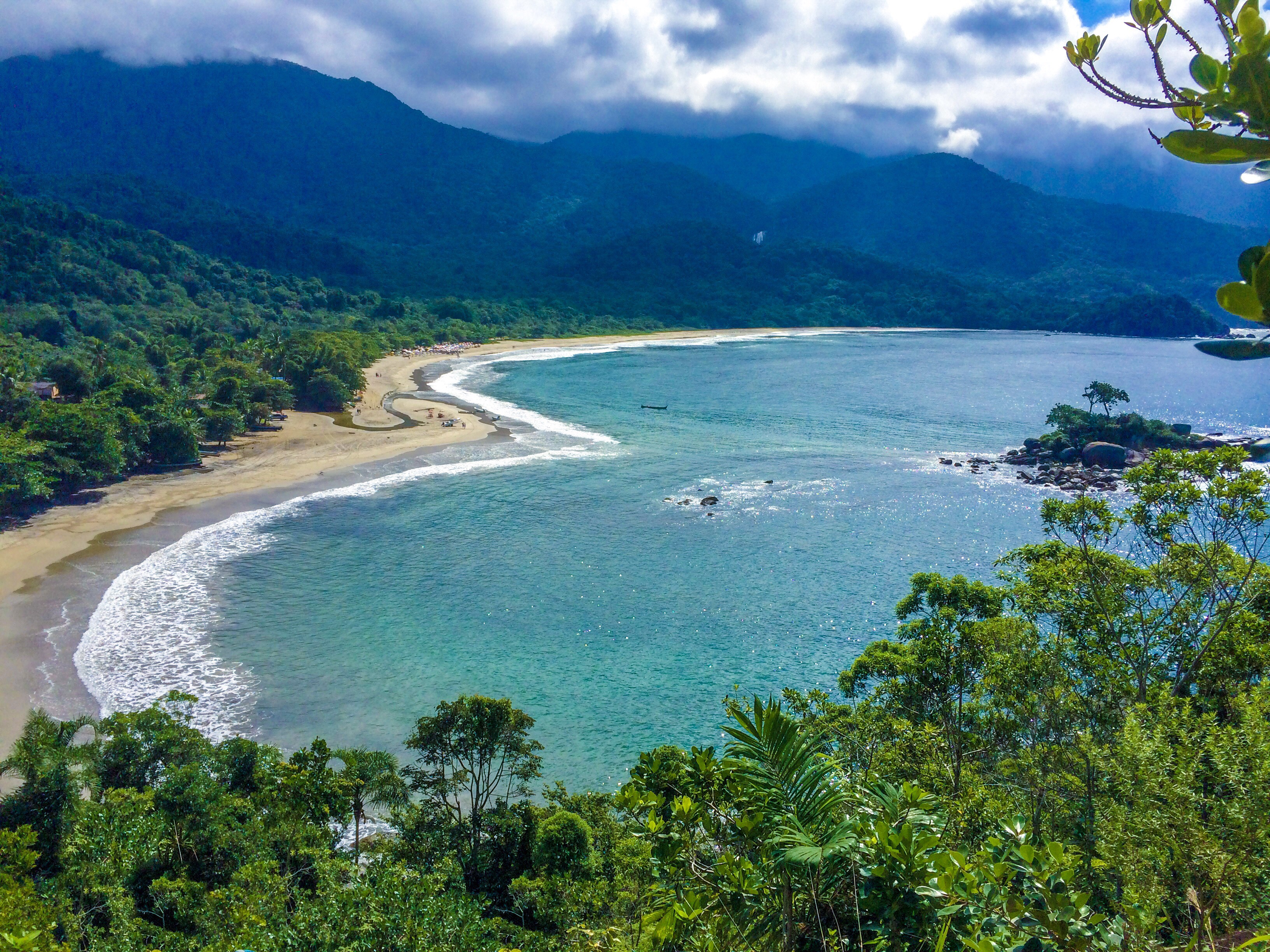 Está foto foi tirada de cima do mirante conhecido como Morante do Coração, pois pode-se ver a Praia de Castelhanos formando a imagem de um coração. A Praia fica localizada na parte sul da Ilhabela, litoral norte de São Paulo.